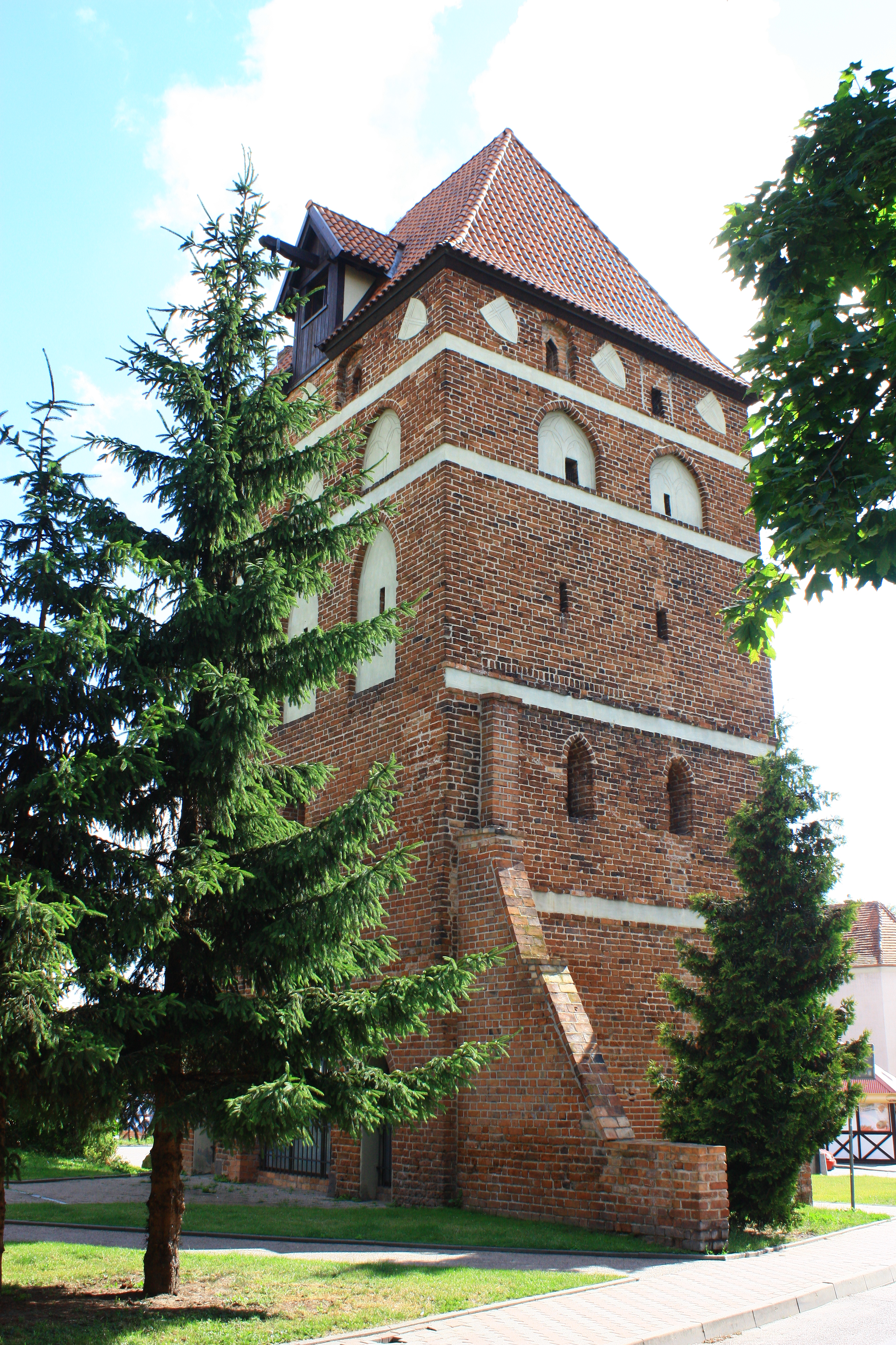 Malbork, Brama Garncarska (Św. Ducha, Elbląska), 2 poł. XIV